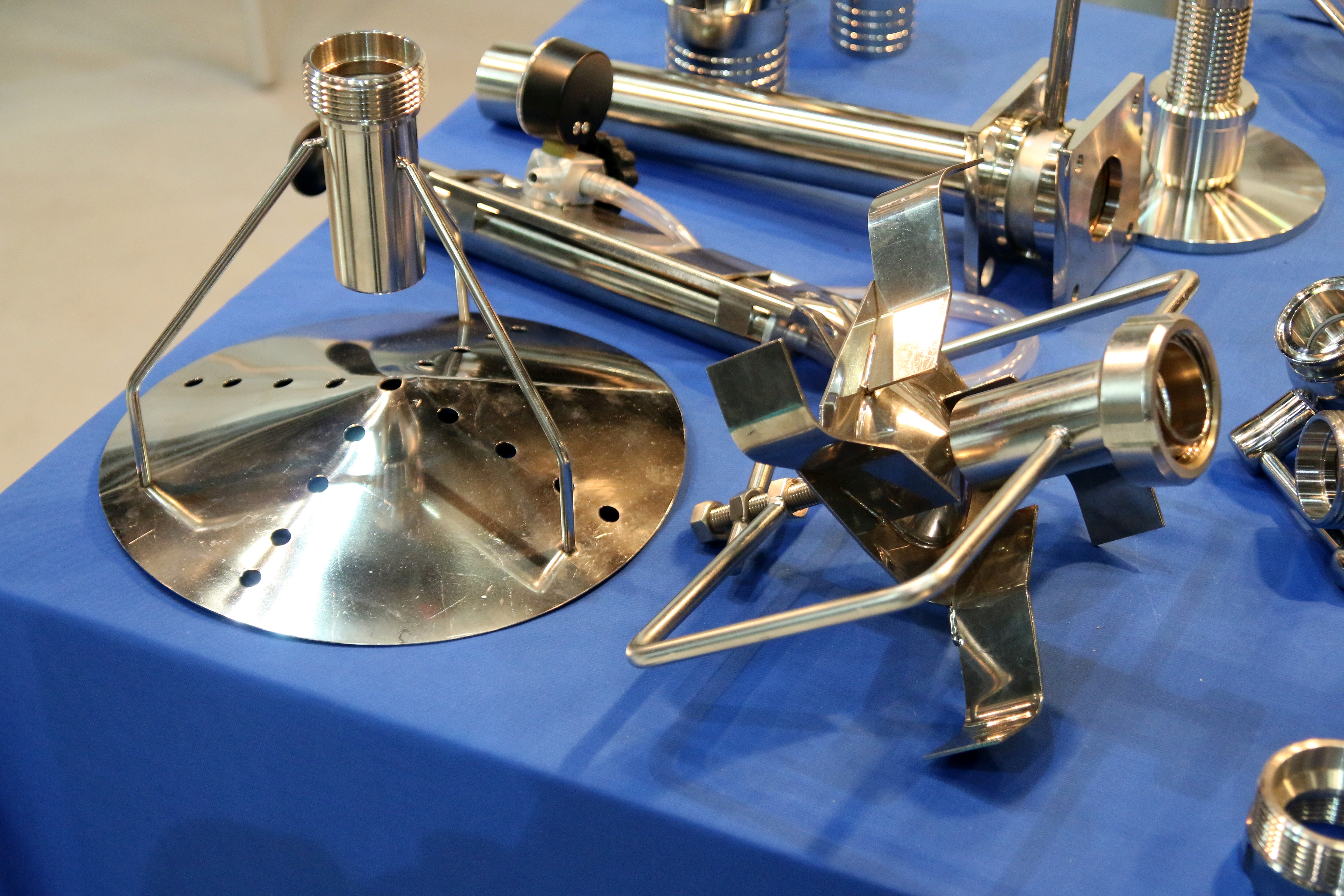 Différents disperseurs vinicoles